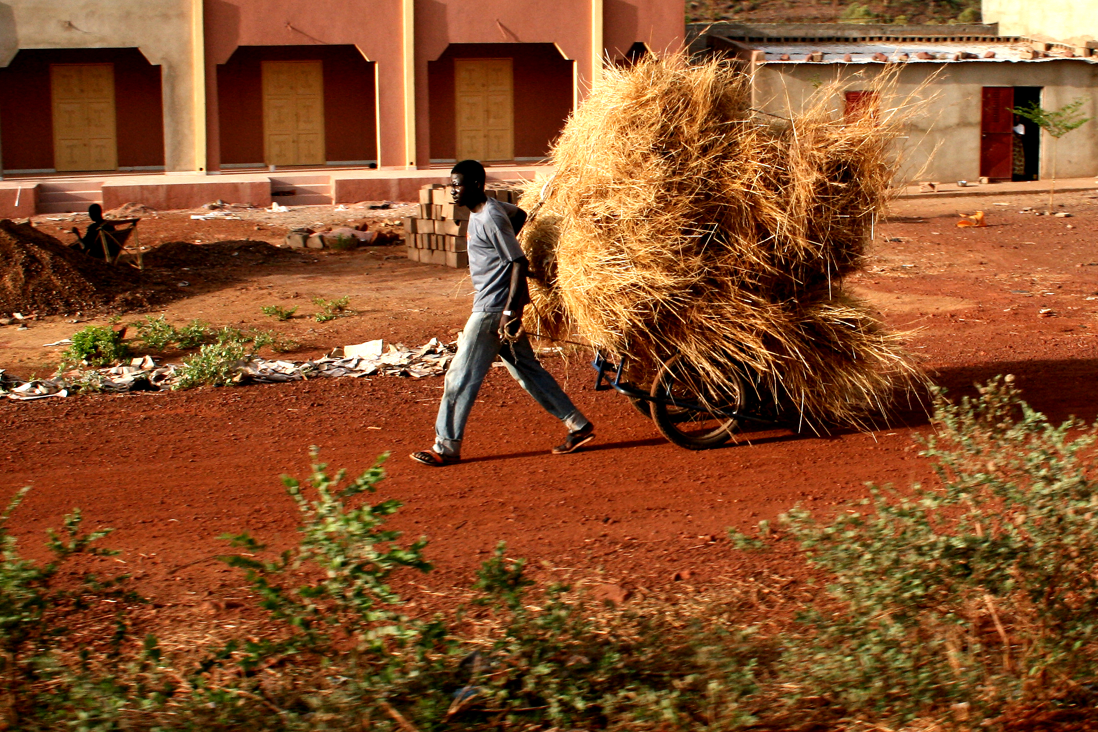 A porter hauling hay in Mali.